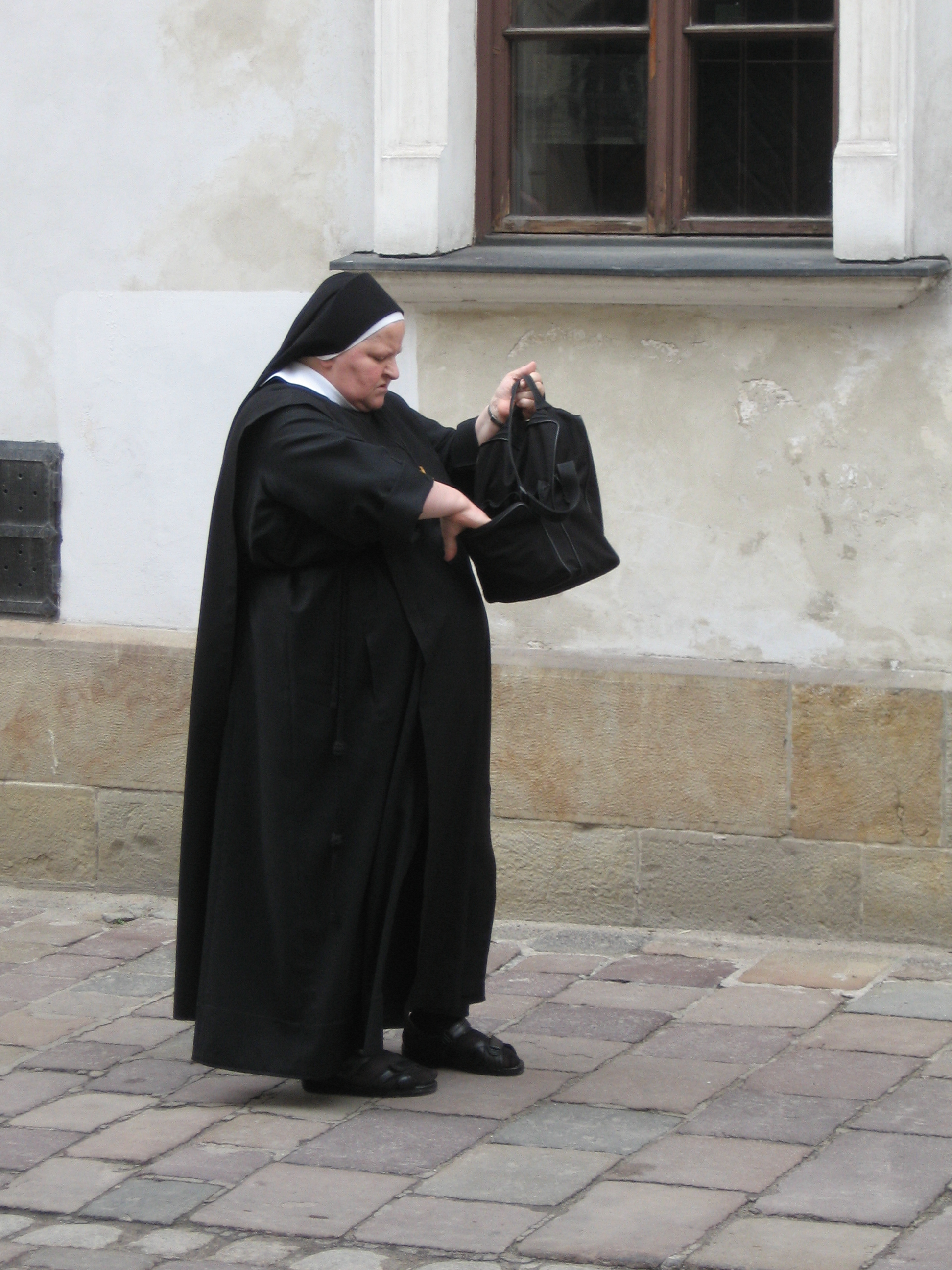 Śluby wieczyste